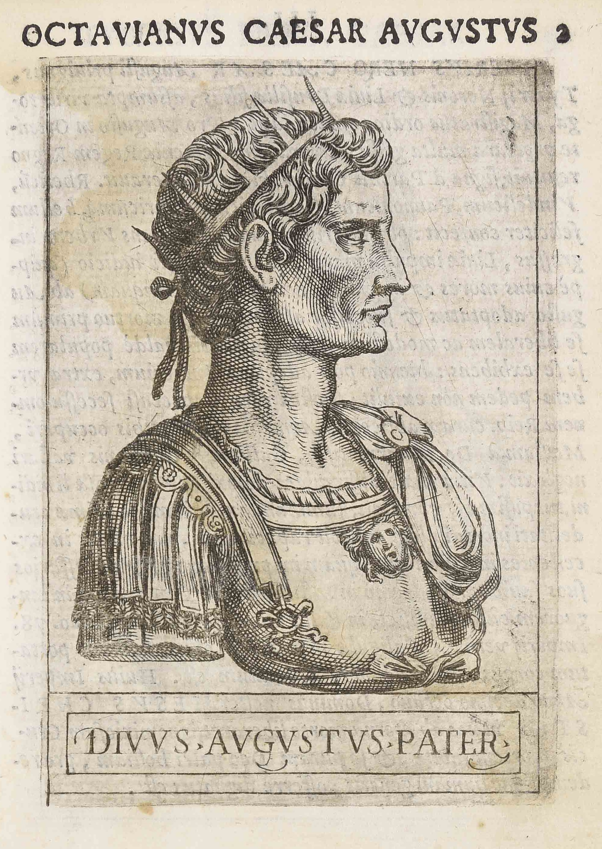 Calcografia in Giovanni Battista Cavalieri & Thomas Treterus, Romanorum imperatorum effigies, Roma, Vincenzo Accolti, 1583.